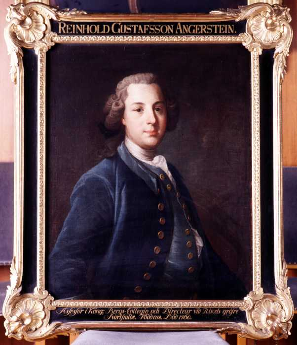 Portrait of Reinhold Angerstein